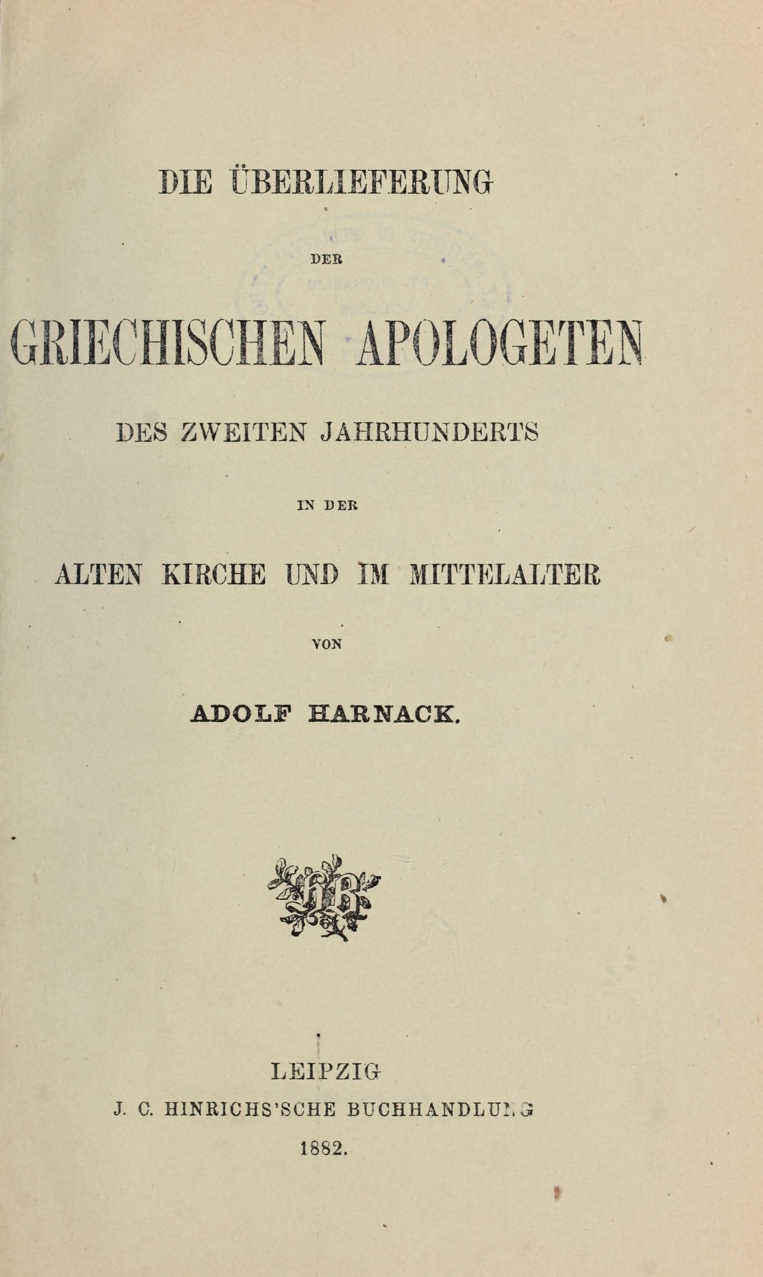 Texte und Untersuchungen zur Geschichte der altchtristlichen Literatur. Die Überlieferung der griechischen Apologeten des zweiten Jahrhunderts, Titelblatt.